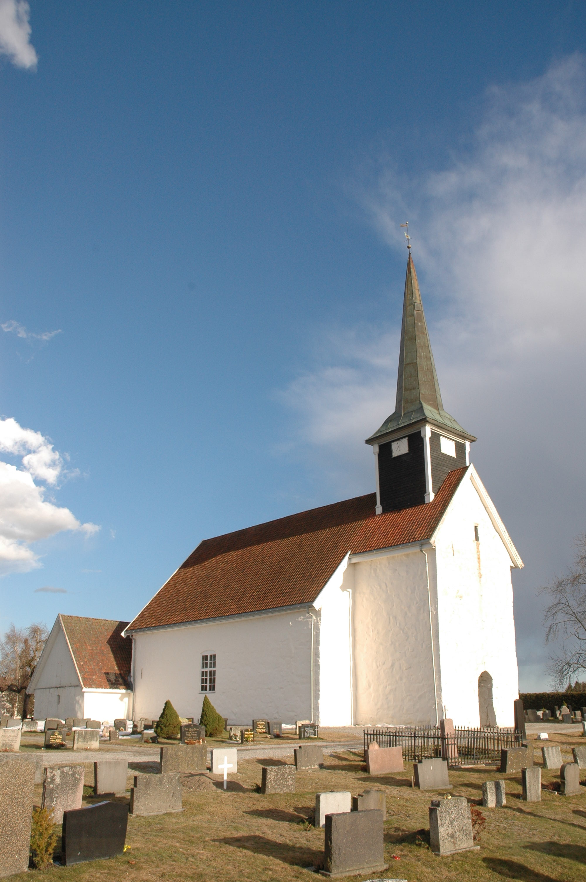 Enebakk kirke